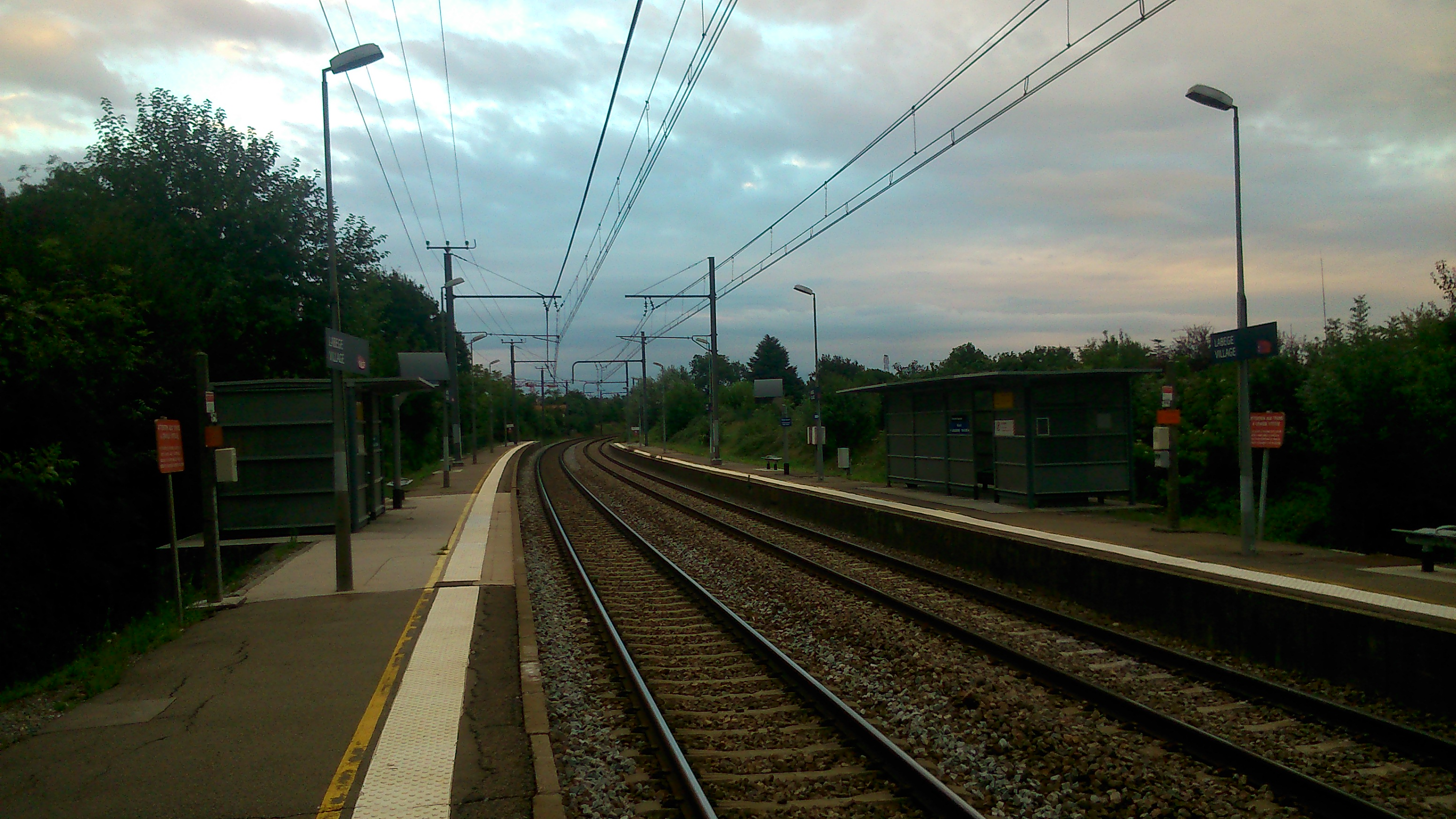 Halte ferroviaire de Labège-Village (Station de la ligne F)